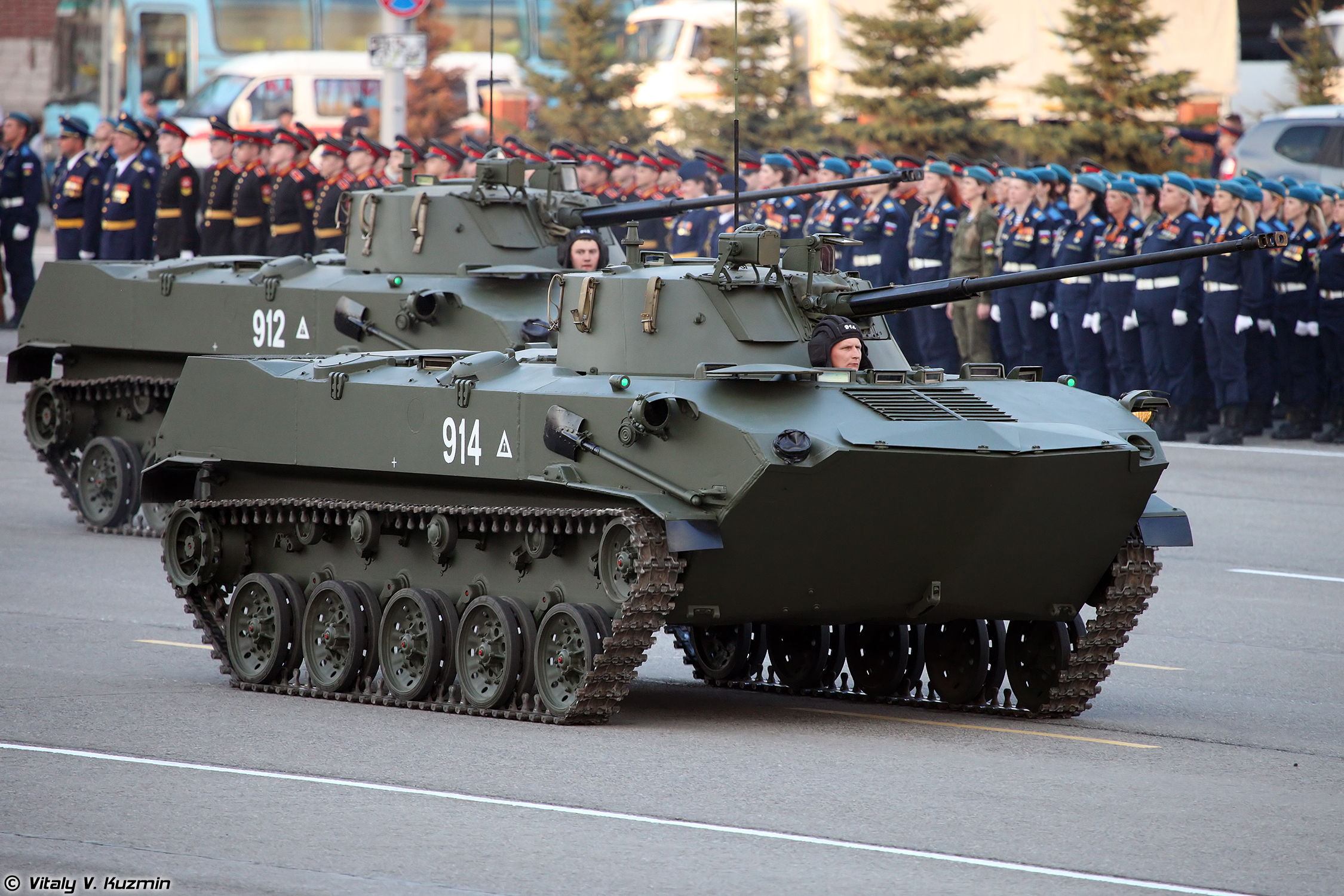 БМД-2 (BMD-2)